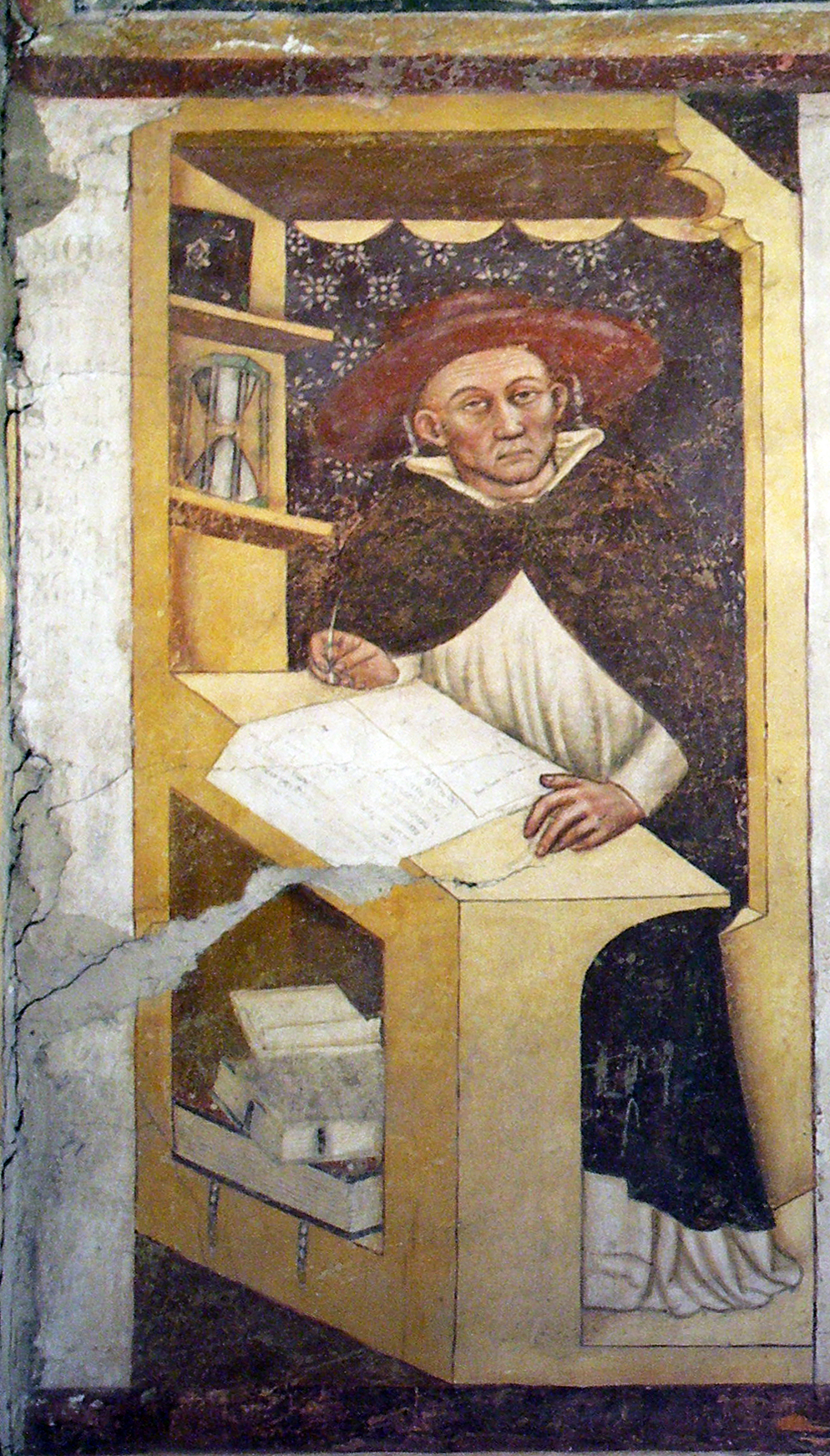 Guglielmo Anglico, serie dei Quaranta domenicani illustri, ex convento di San Niccolò, Sala del Capitolo, Treviso, 1352 (altezza di ciascun ritratto 150 cm circa)